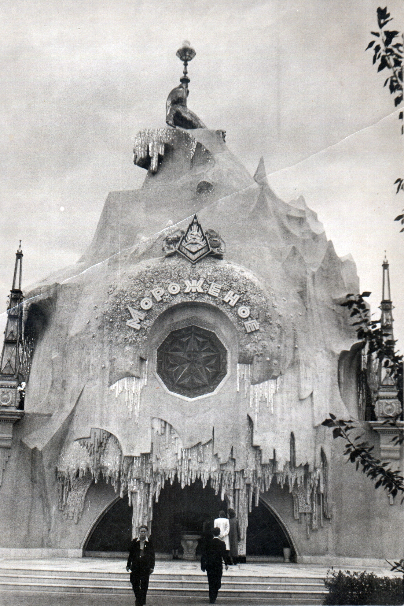 Утраченный павильон ВСХВ-ВДНХ „Мороженое“, 1955 год. Выстроен взамен пришедшего в негодность прежнего "Главхладопрома" 1939 в квартале за павильонами «Узбекская ССР» и «Карело-Финская ССР». Снесен в 1980-е годы. Место не застроено, на его месте узбекский (?) сквер.